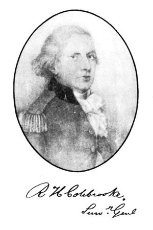 Robert Hyde Colebrooke (1762? - 1808)